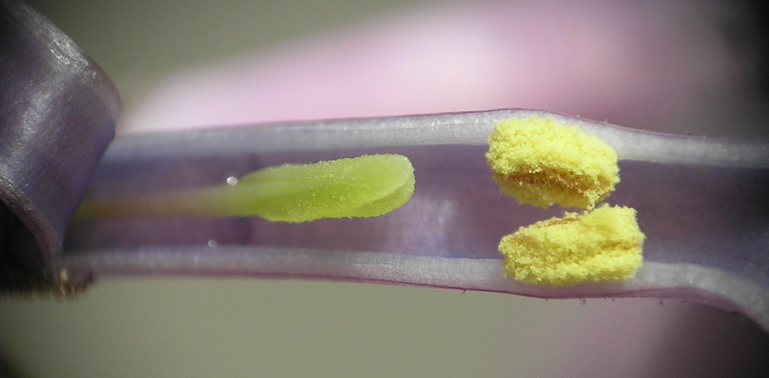 Ordinara siringo